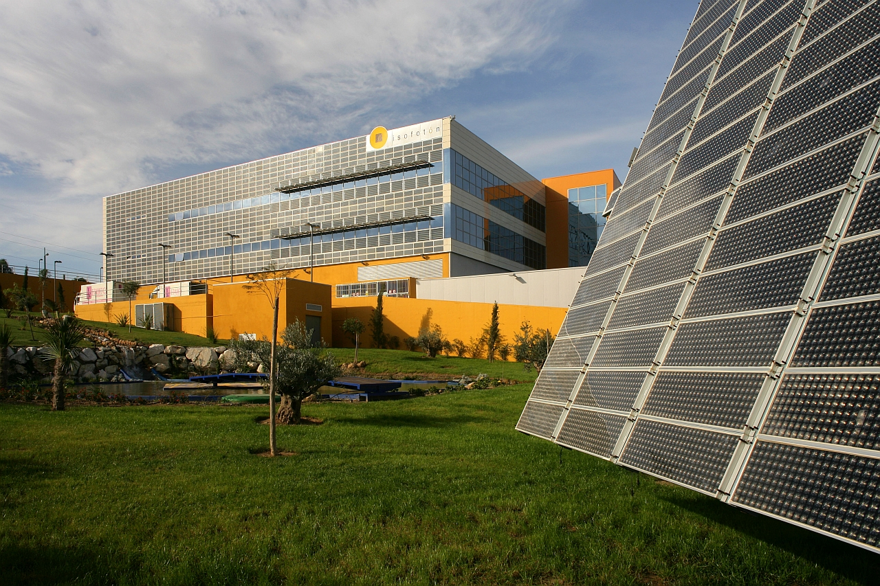 Forschungs- und Produktionszentrum von Isofotón in Malaga, Spanien